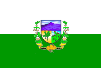 Bandeira de Angicos, Rio Grande do Norte, Brasil.